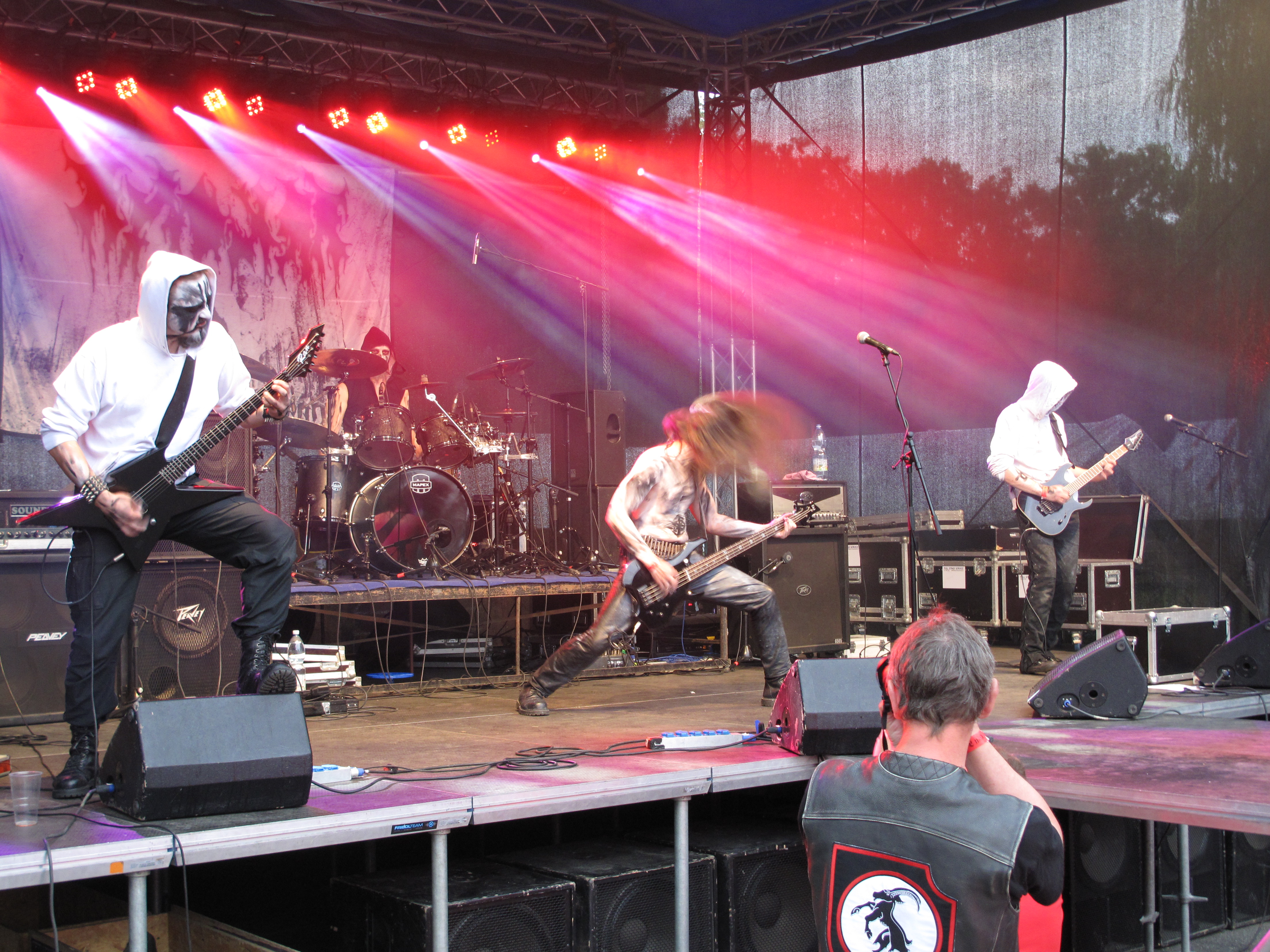 Arkona (polská) na festivalu Hell Fast Attack